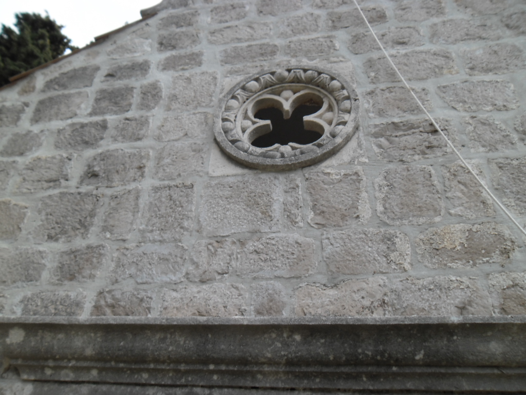 prizor s Crkve sv. Stjepana u Suđurađu na otoku Šipanu